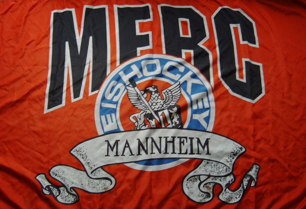 Fahne des MERC (Mannheimer Eis- und Rollsport-Club), ca. 1989